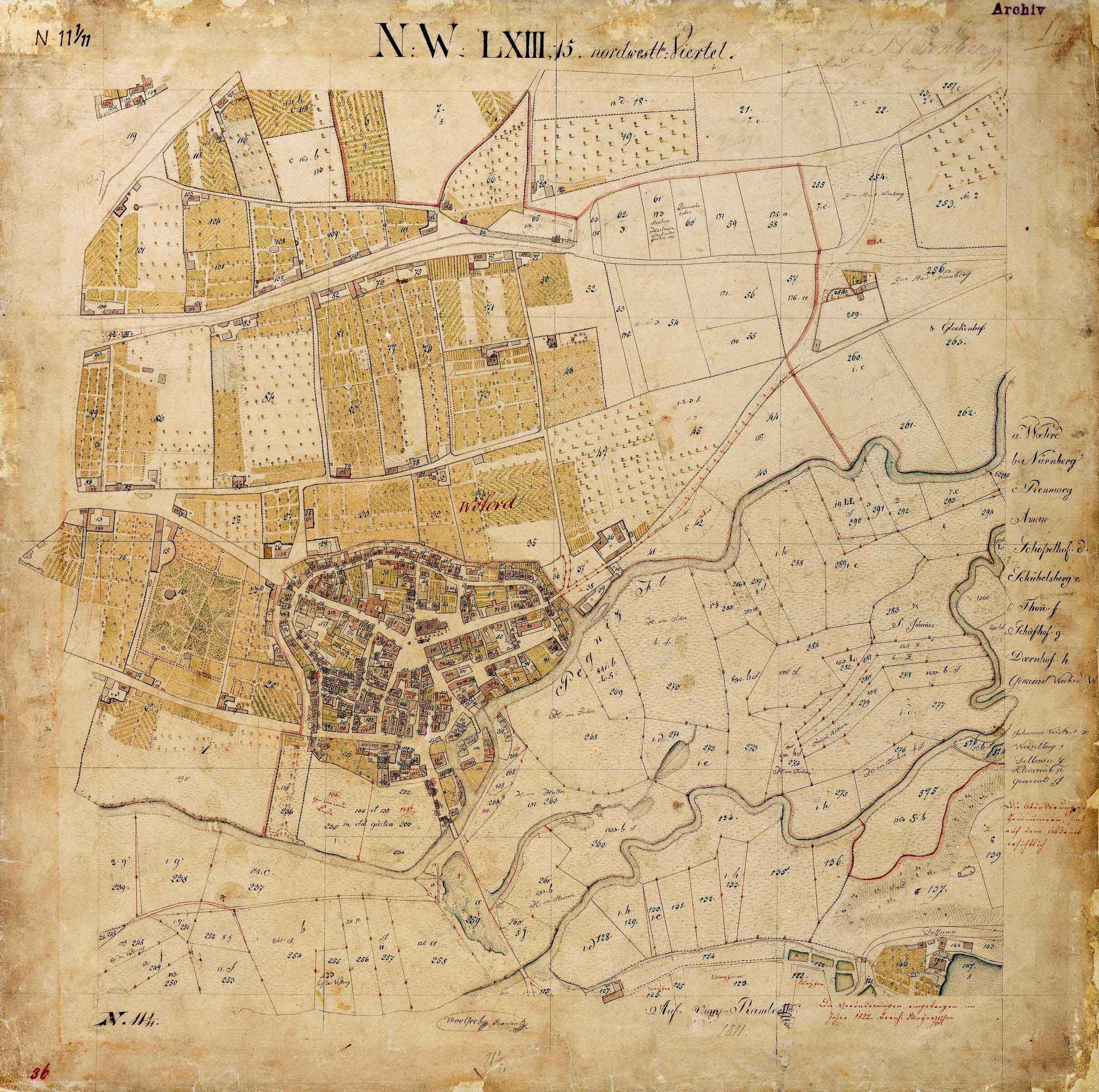 Wöhrd, Plan der Steuer-Kataster-Kommission (später Katasterbureau) des Königreichs Bayern